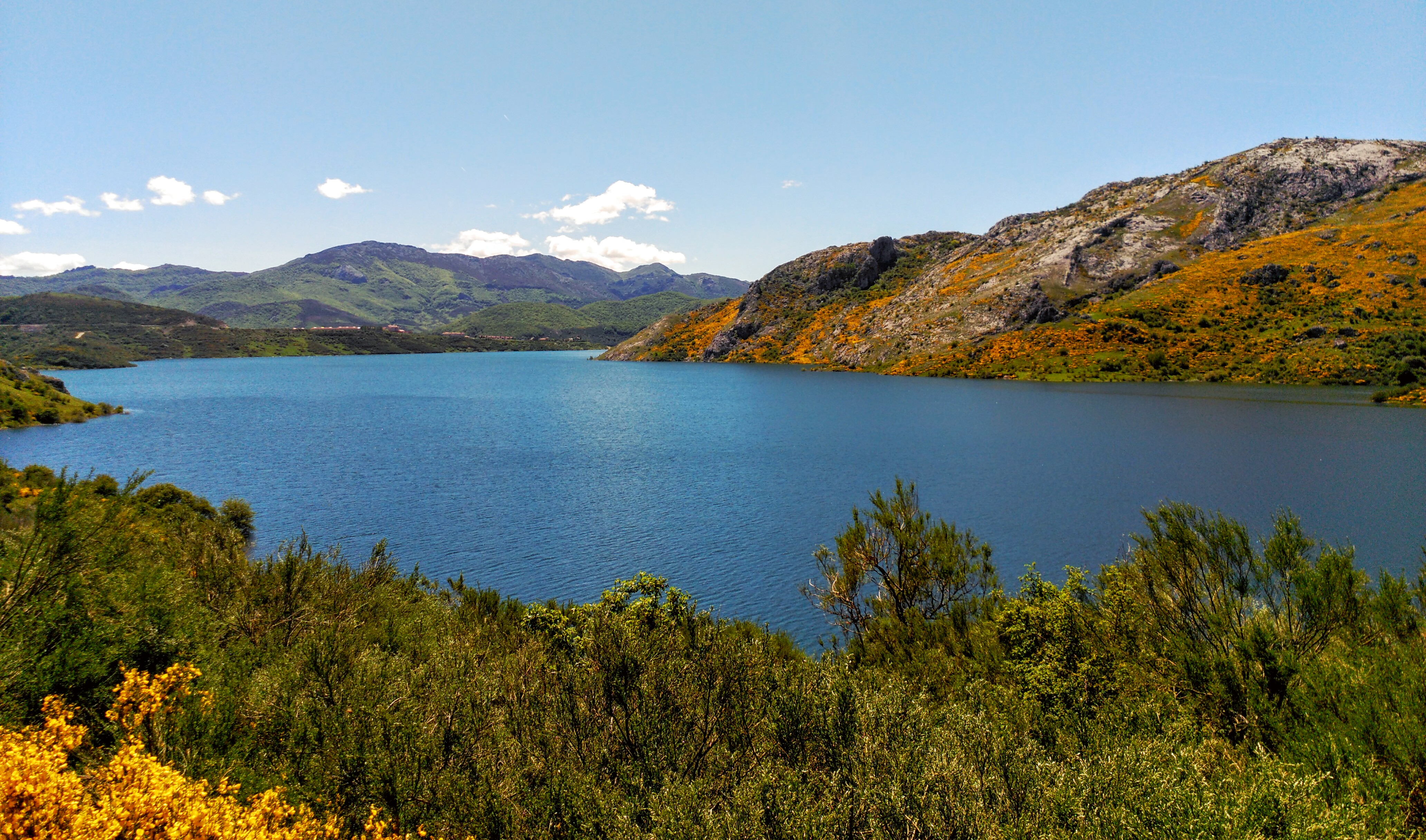 Imagen del Embalse de Riaño el 17 de mayo de 2015, en el podemos apreciar el paisaje que nos ofrece la parte norte del embalse.